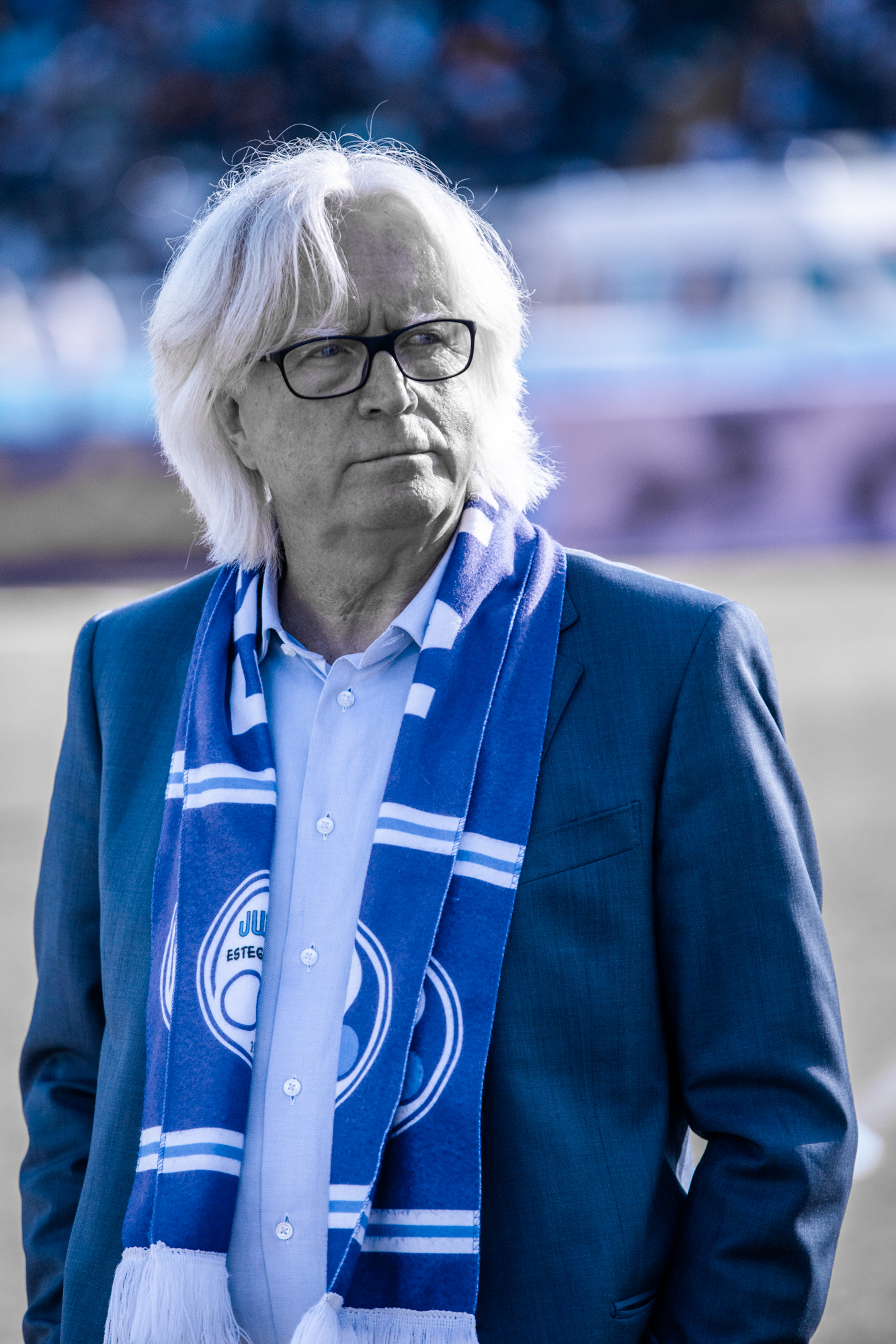 این عکس توسط پوریا افخمی در استادیوم ثامن مشهد در حاشیه تقابل پدیده مشهد و استقلال تهران ثبت شده است.